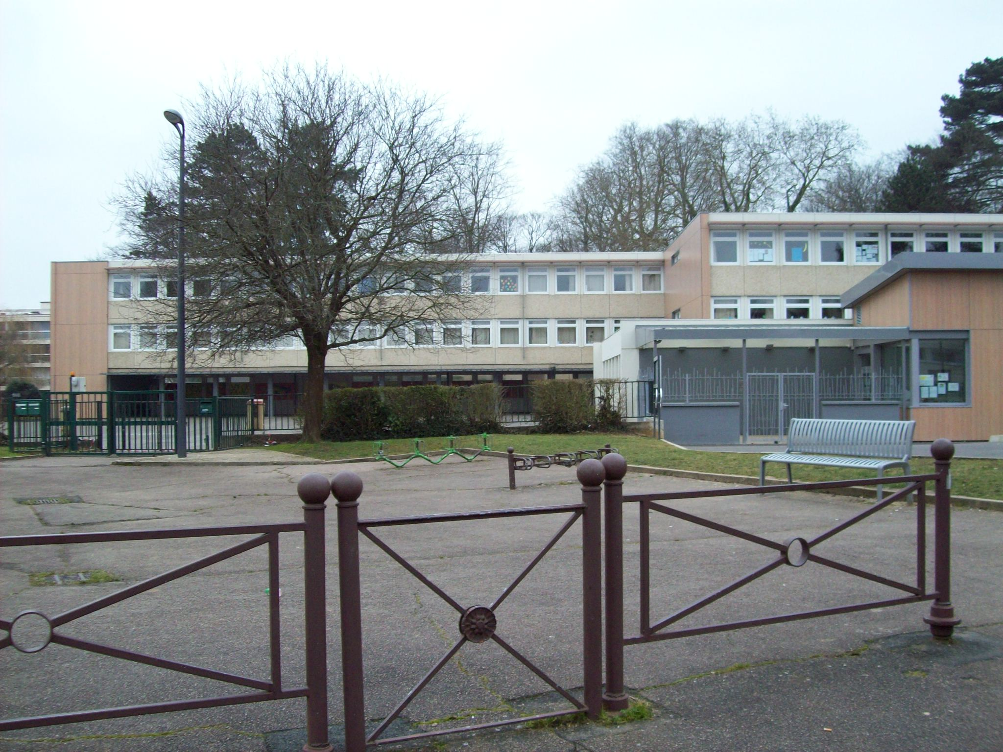 Bailly (78) - l'école primaire.